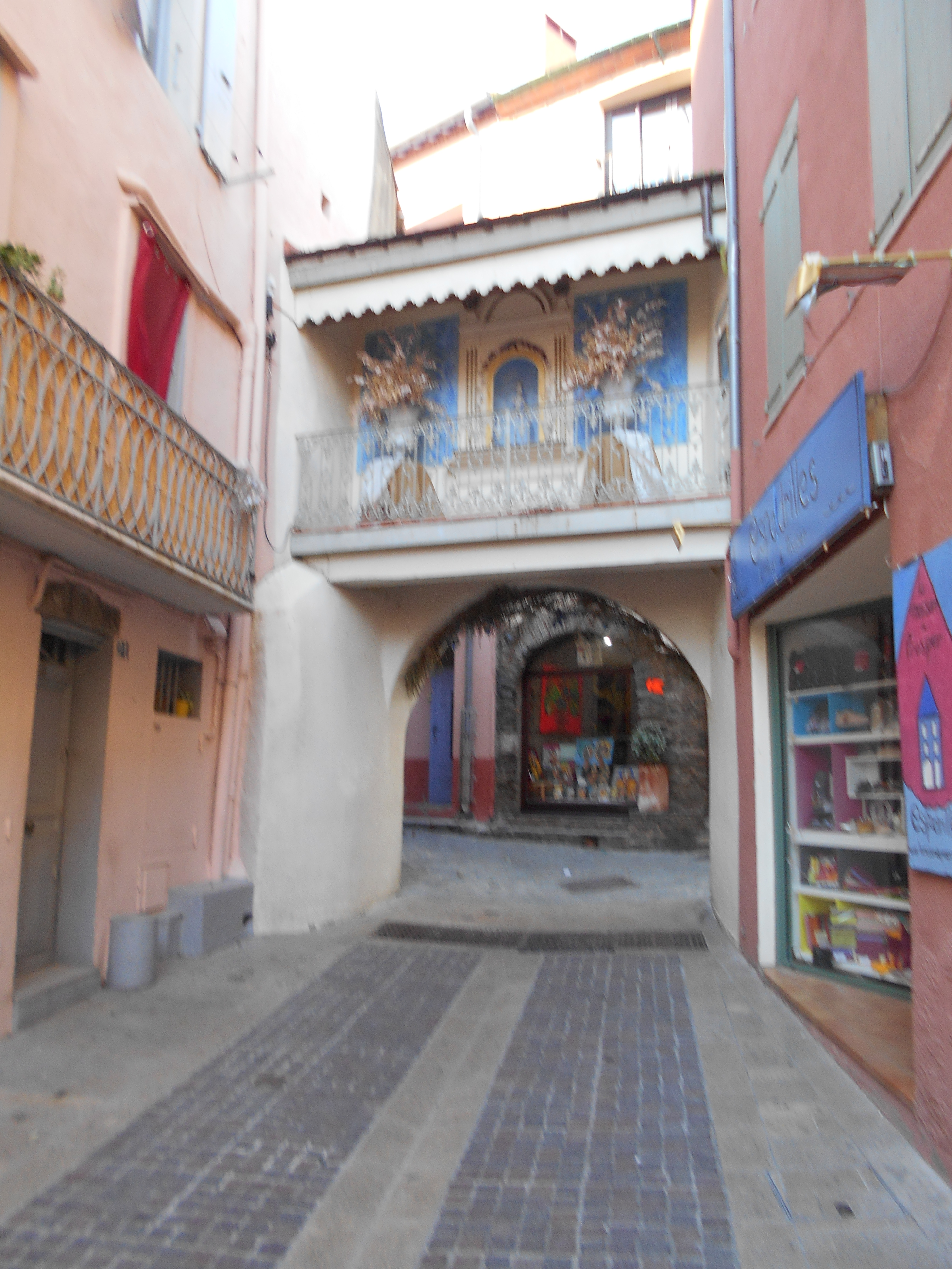 Capella de carrer de la Mare de Déu del Bon Succés, a Cotlliure.